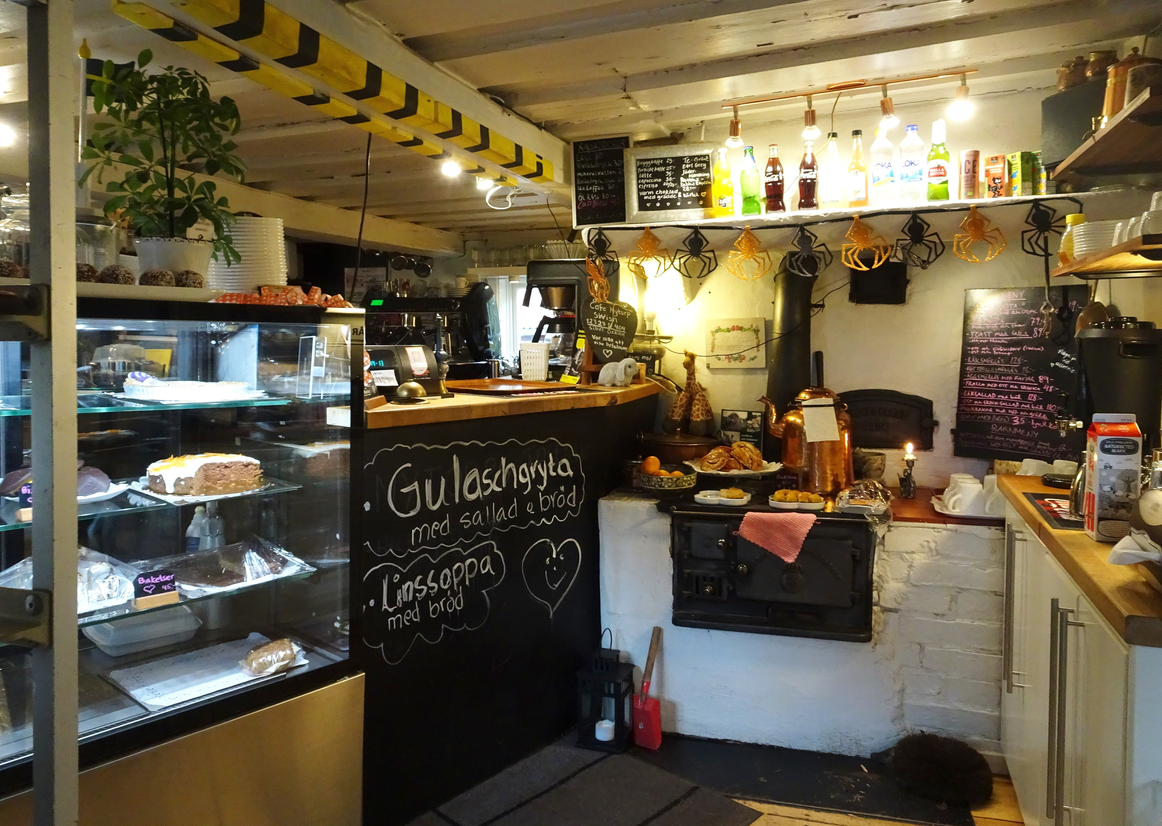 Nytorp vid Gamla Stockholmsvägen i Glömsta, Huddinge kommun